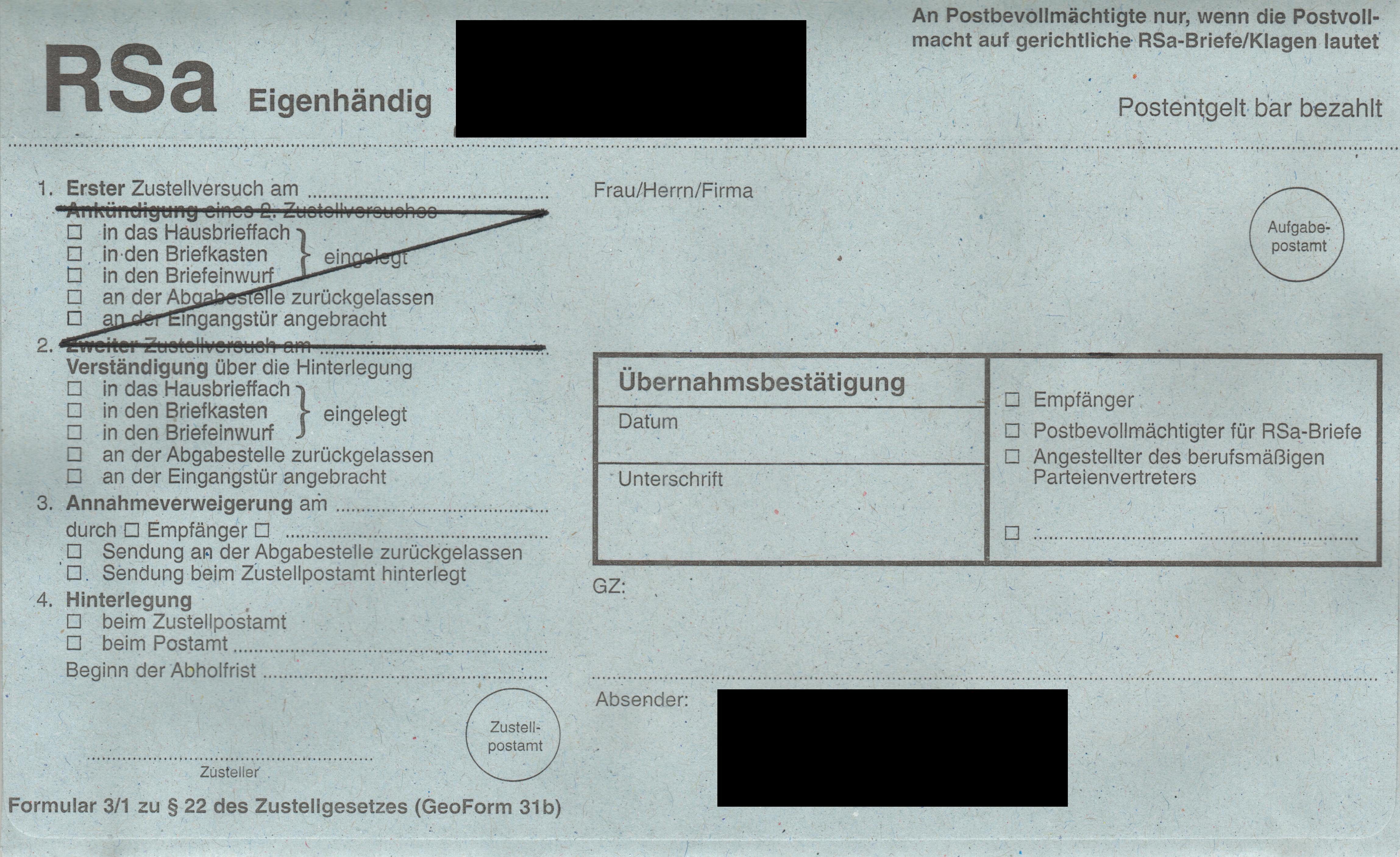 Aufgrund der Änderung des Zustellgesetzes werden die RSa-Briefe nur noch ein Mal zugestellt. Neue Drucksorten lassen allerdings noch auf sich warten.